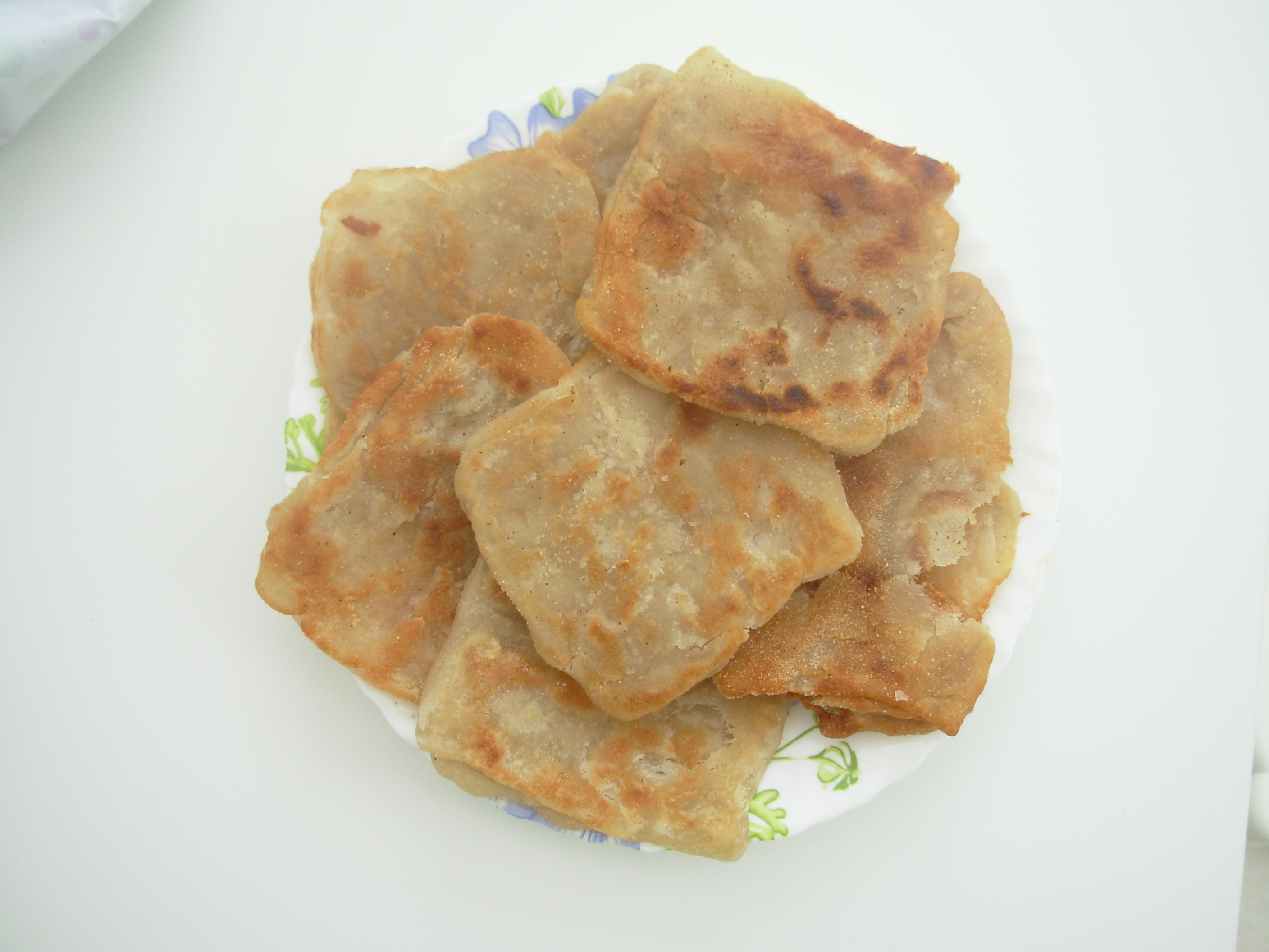 Assortiment de msemmen (ou ghrayef)